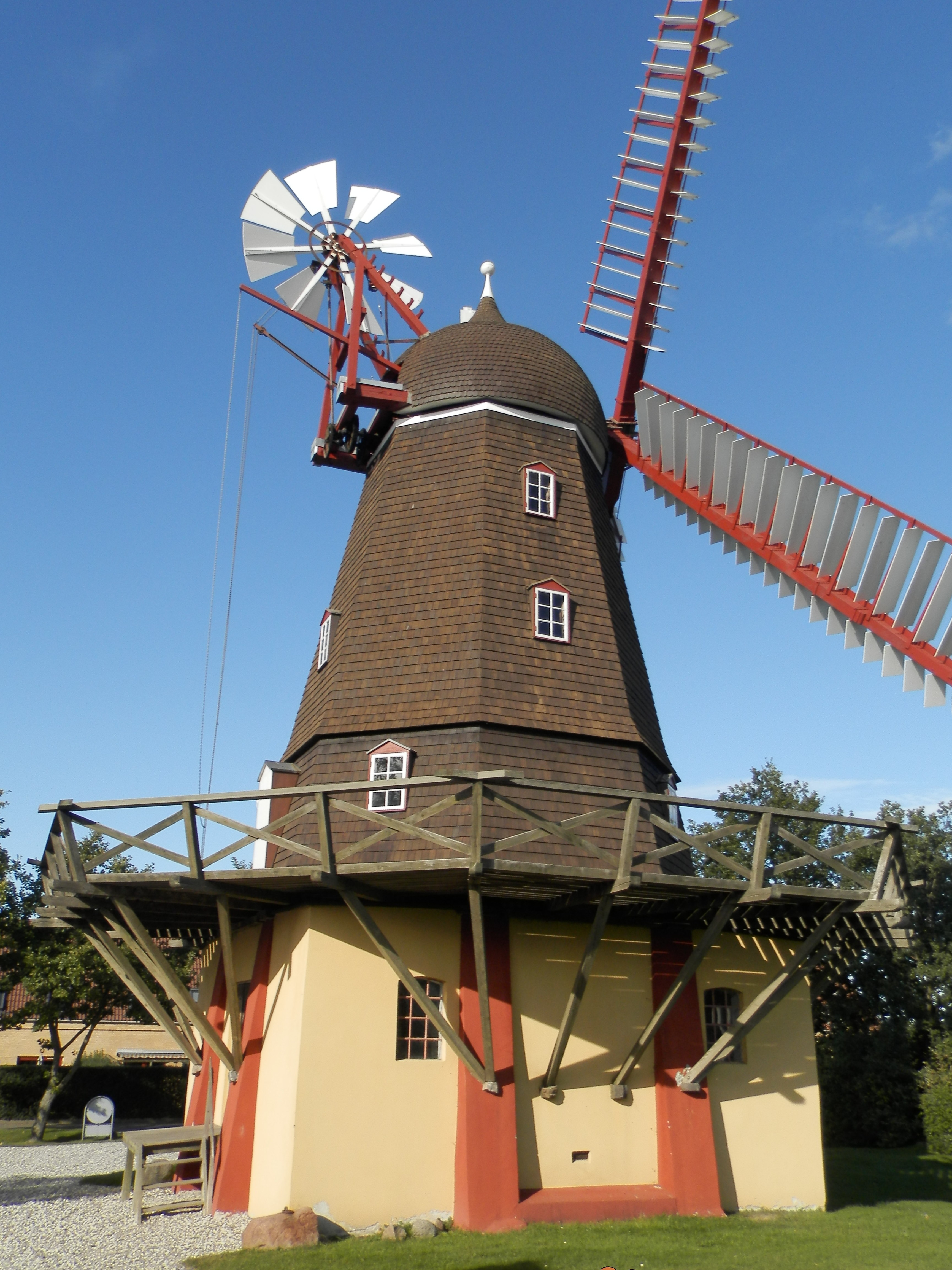 Ramløse Mølle september 2013